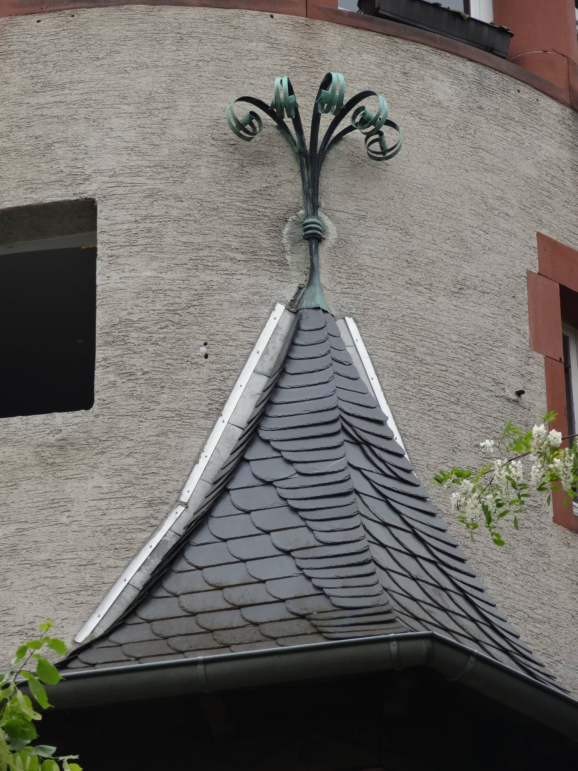 Haus Haardteck, Herdweg 79 in Darmstadt